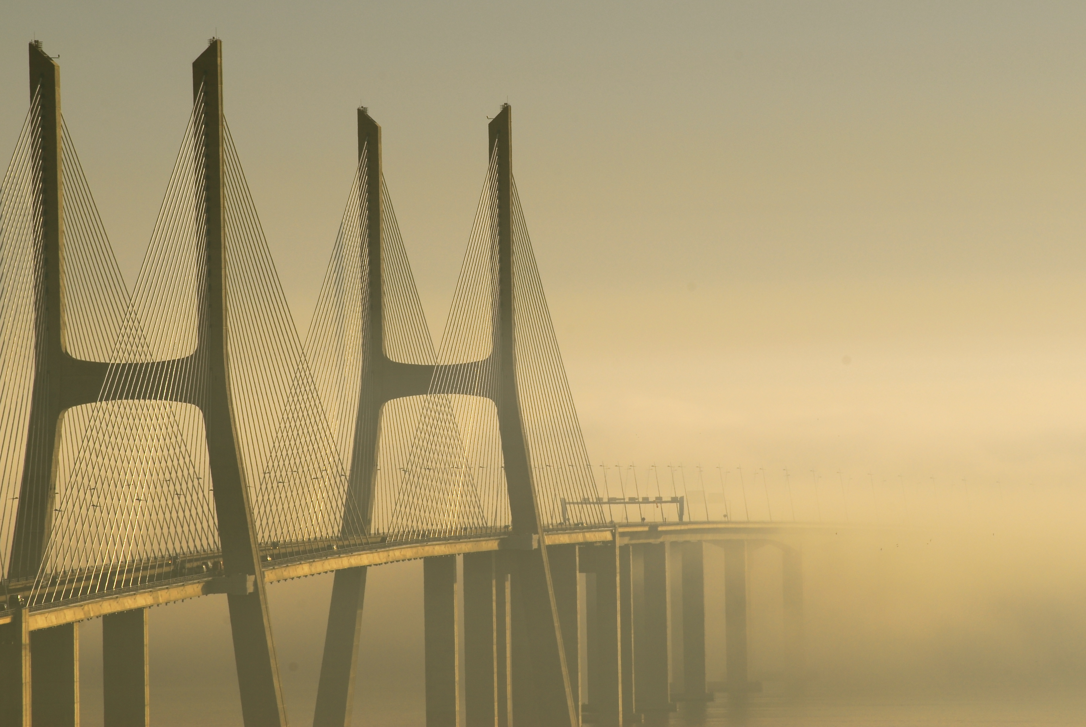 Vasco da Gama Bridge. Lisbon, Portugal